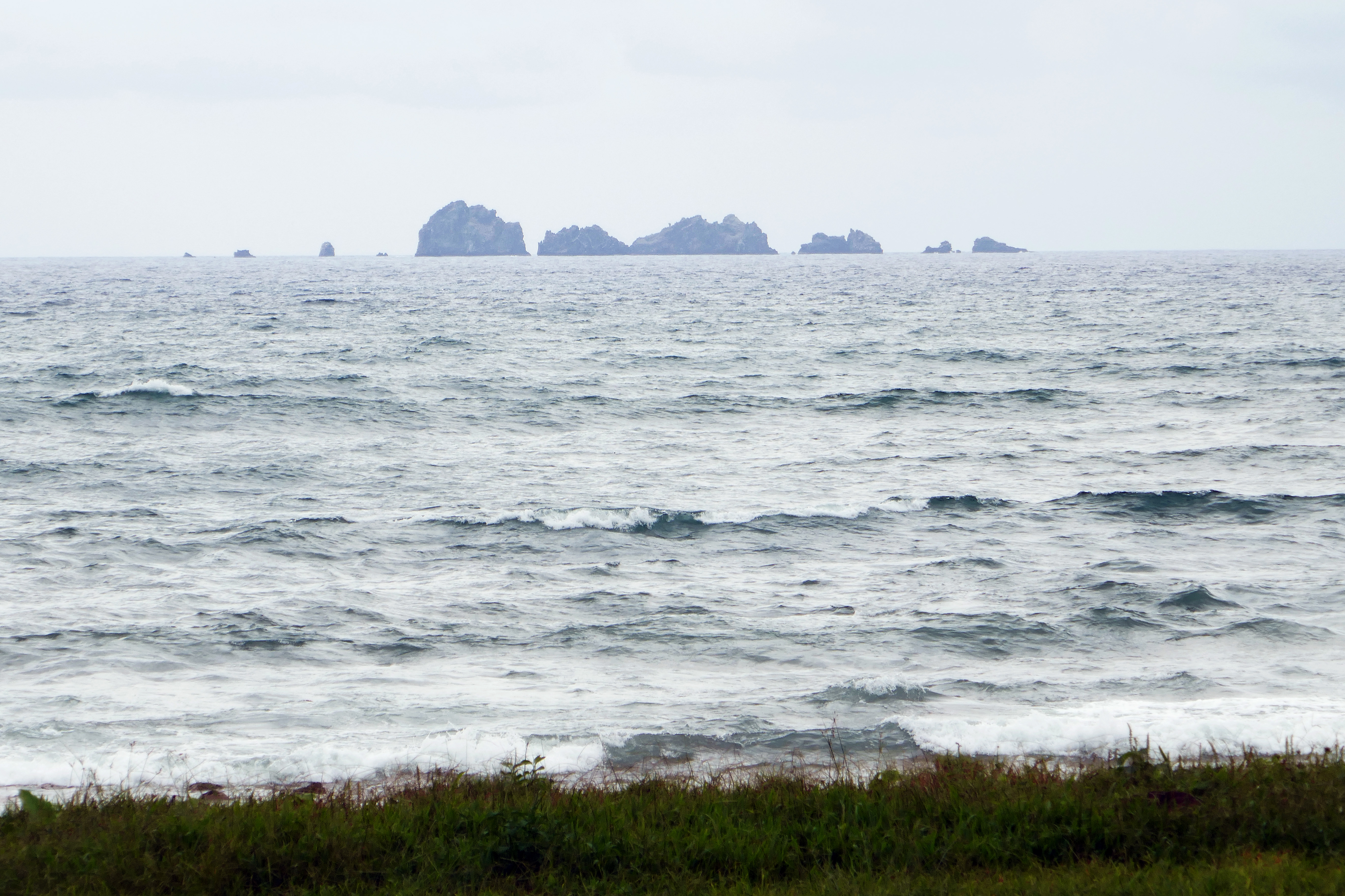 Les Sete Pedras (ou "sept pierres"), une série d'îlots rocheux inhabités au large de l'île de São Tomé (São Tomé-et-Principe), vues ici depuis Ribeira Peixe, au sud-est.